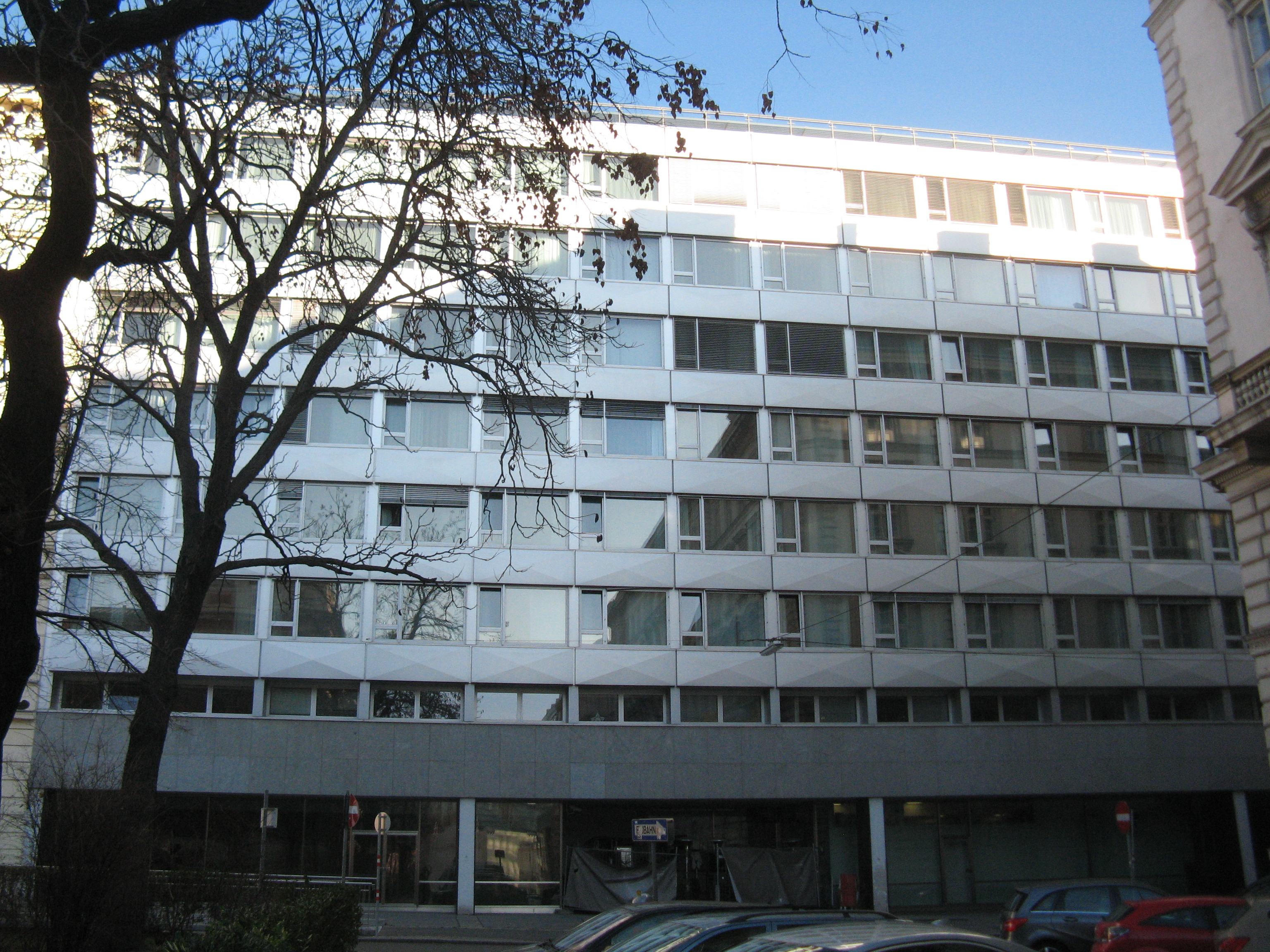 Böhlerhaus (1956-58), Elisabethstraße 12, von Roland Rainer, Wien-Innere Stadt